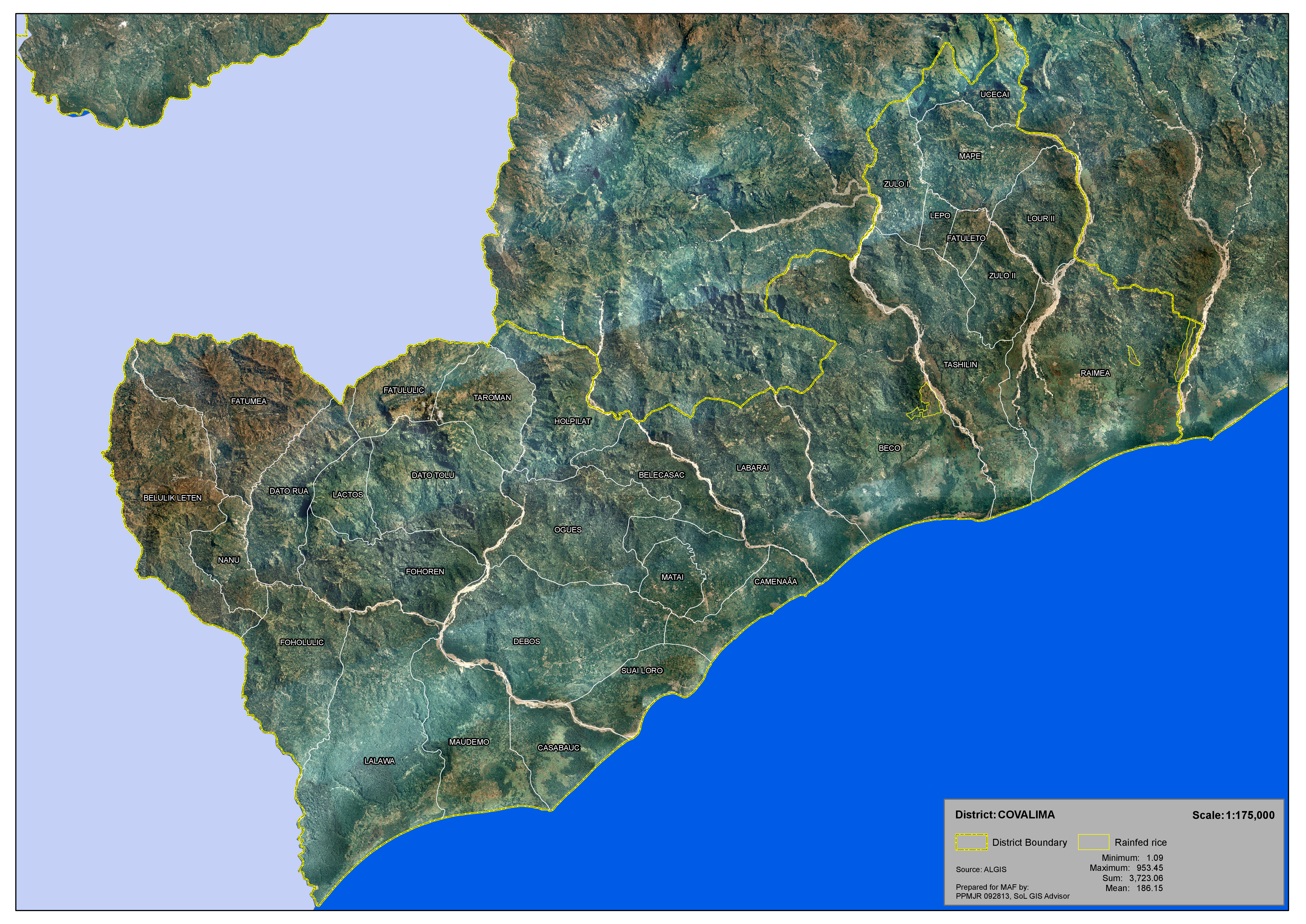 Reisfelder im Distrikt Cova Lima